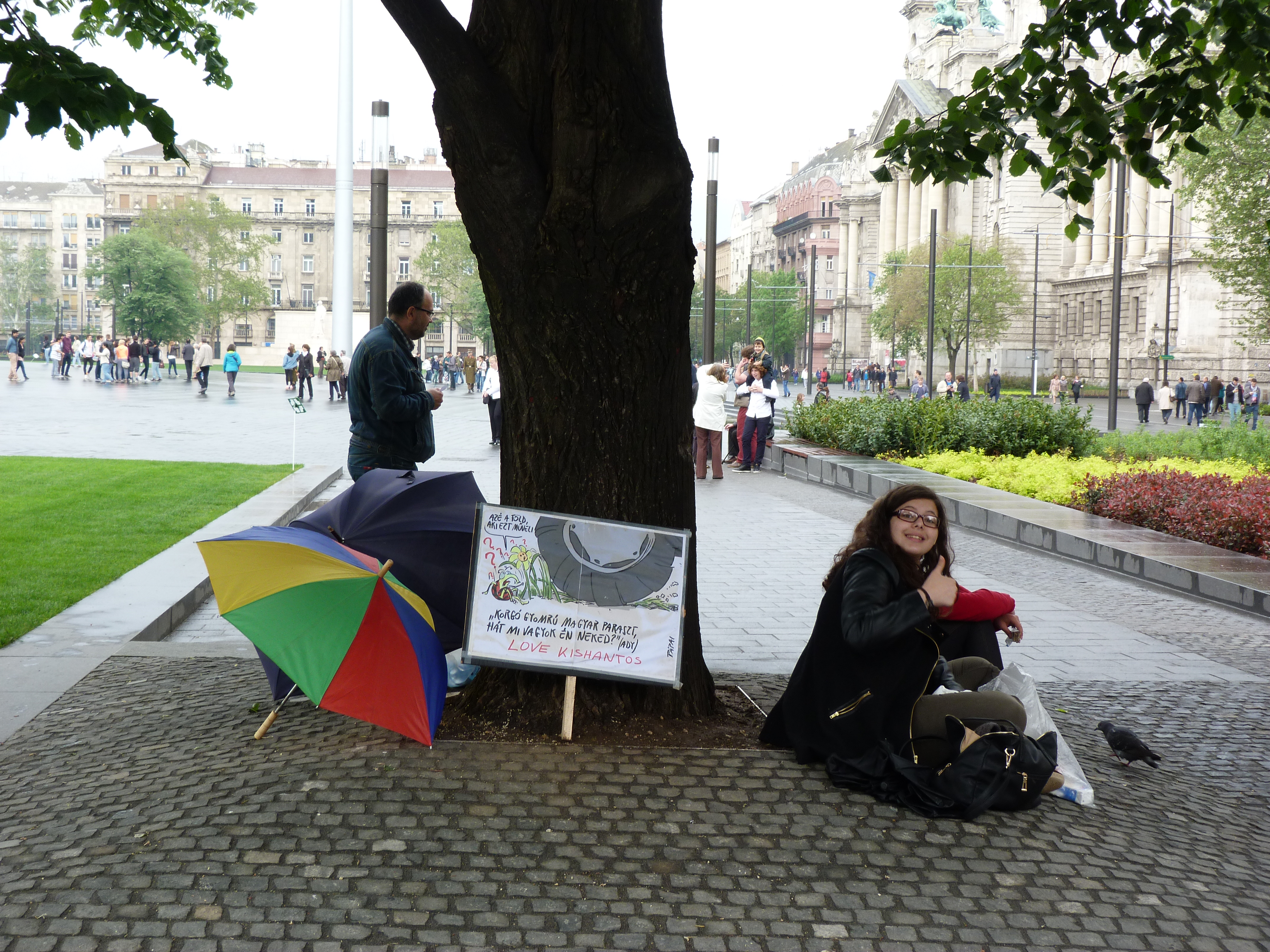 A felvétel 2014. április 26-án készült Budapesten, a Kossuth téren. Kishantos. ©© Derzsi Elekes Andor, Budapest, 2014, A kép és filmfelvételek egészben, vagy részletekben másolását, bármilyen úton történő sokszorosítását és felhasználását a szerző ellenérték nélkül, jogutódjaira is kihatóan megengedi. Az engedély kiterjed a kereskedelmi célú hasznosításra is. Kéri azonban nevének feltüntetését a felhasználás során. A Metapolisz sorozat valamennyi képe és filmje Creative Commons alatti valamint kereskedelmi - for profit - célra is felhasználható. Ajánlott hivatkozás: Derzsi Elekes Andor: Metapolisz DVD line